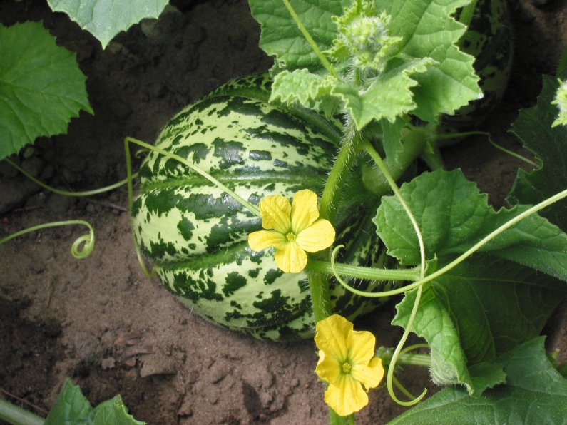 Meloenplant van Oranje Ananas; begin juli.